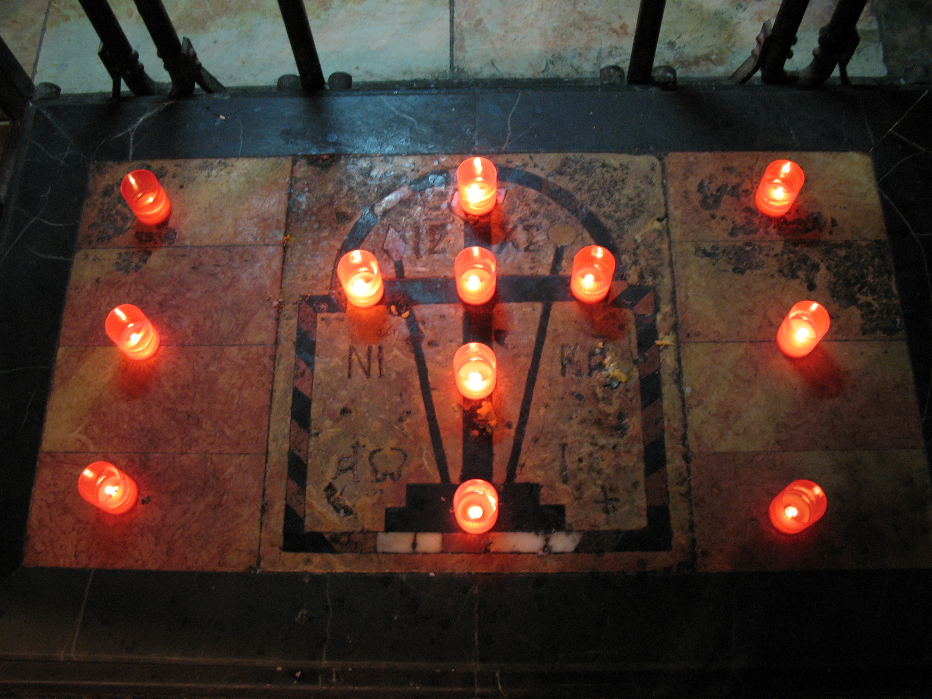 Мраморная плита на полу отмечает место где был найден Крест Господень святой царицей Еленой. Придел Обретения Креста Храма Гроба Господня в Иерусалиме